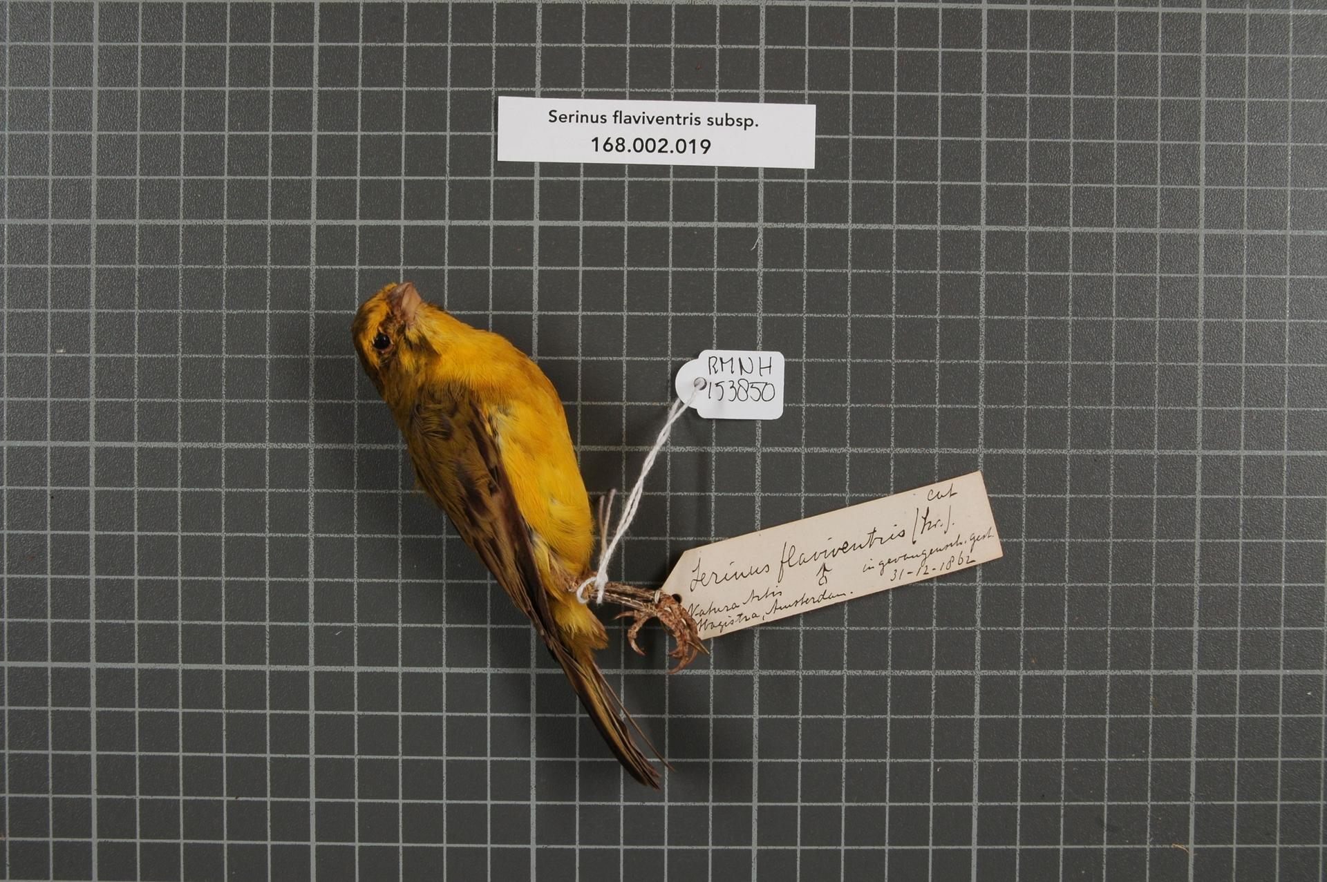 Serinus flaviventris subsp.